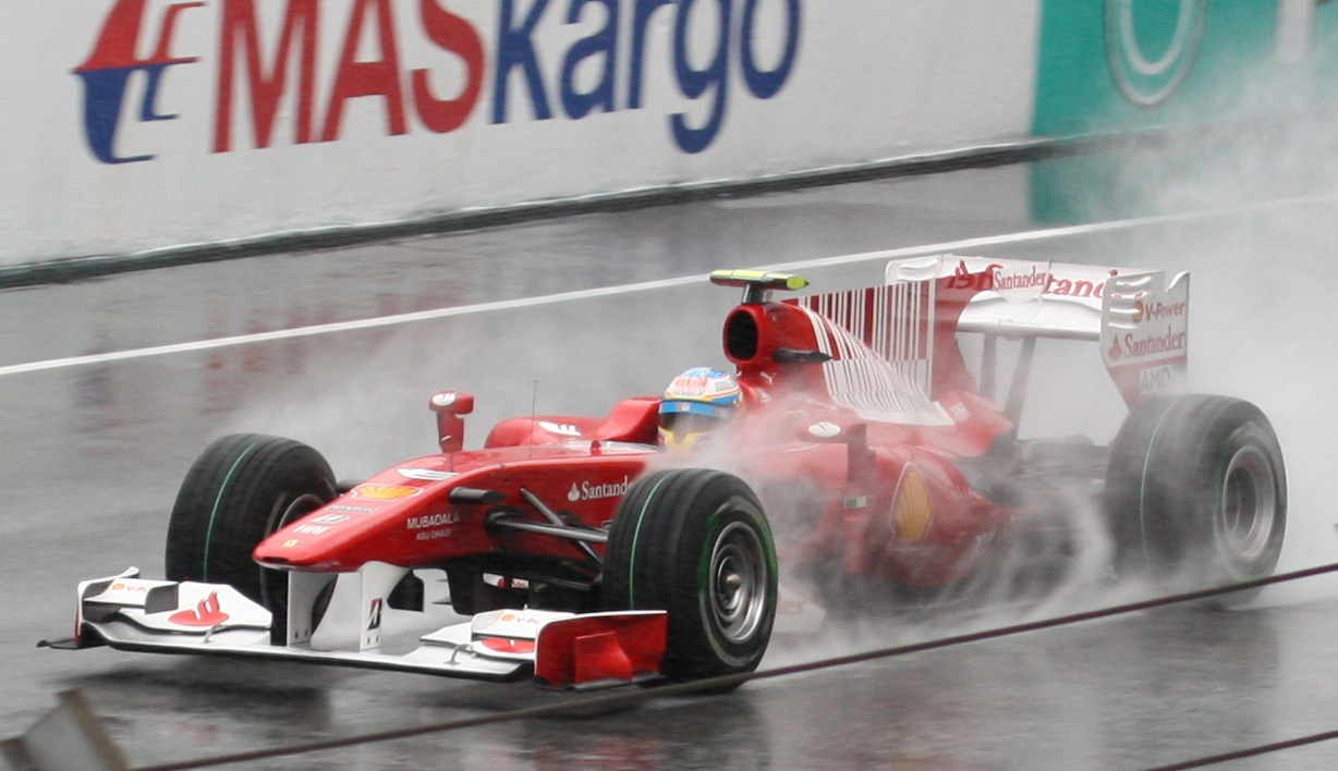 Alonso qualy